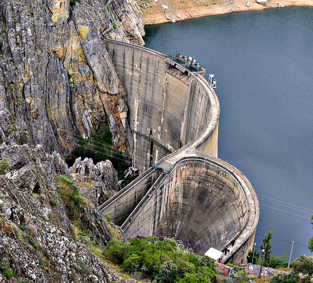 Serra do Açor Portugal